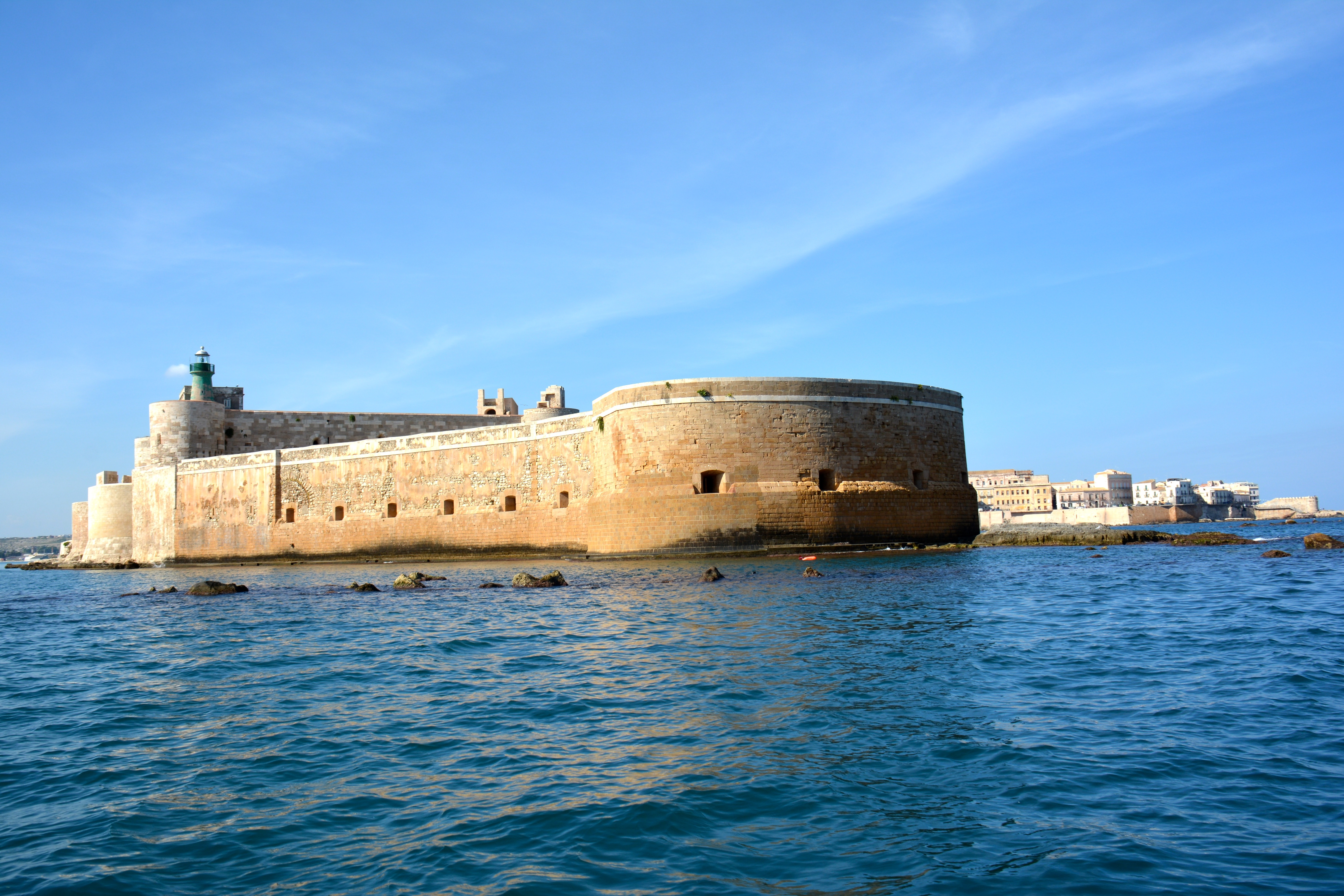 Castello Maniace dal mare